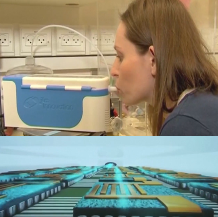 Elektroonilise nina üks rakendustest